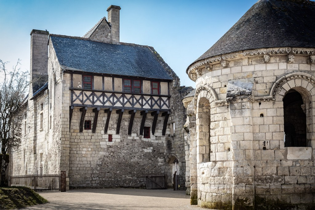 Domaine Tours